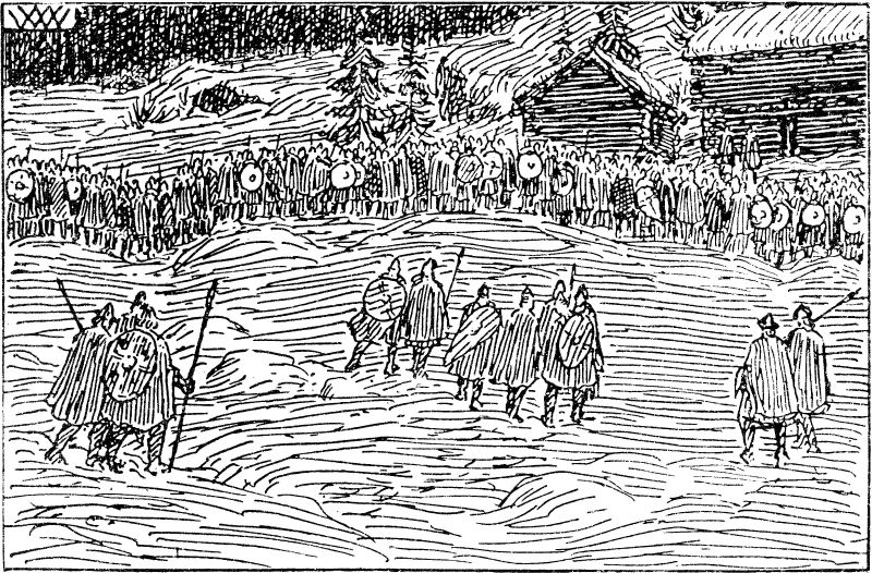 Wilhelm Wetlesen: Illustration for Håkon Herdebreis saga, Heimskringla 1899-edition. nn: «Då let kong Inge blåse hæren i hop og ut or byen.»